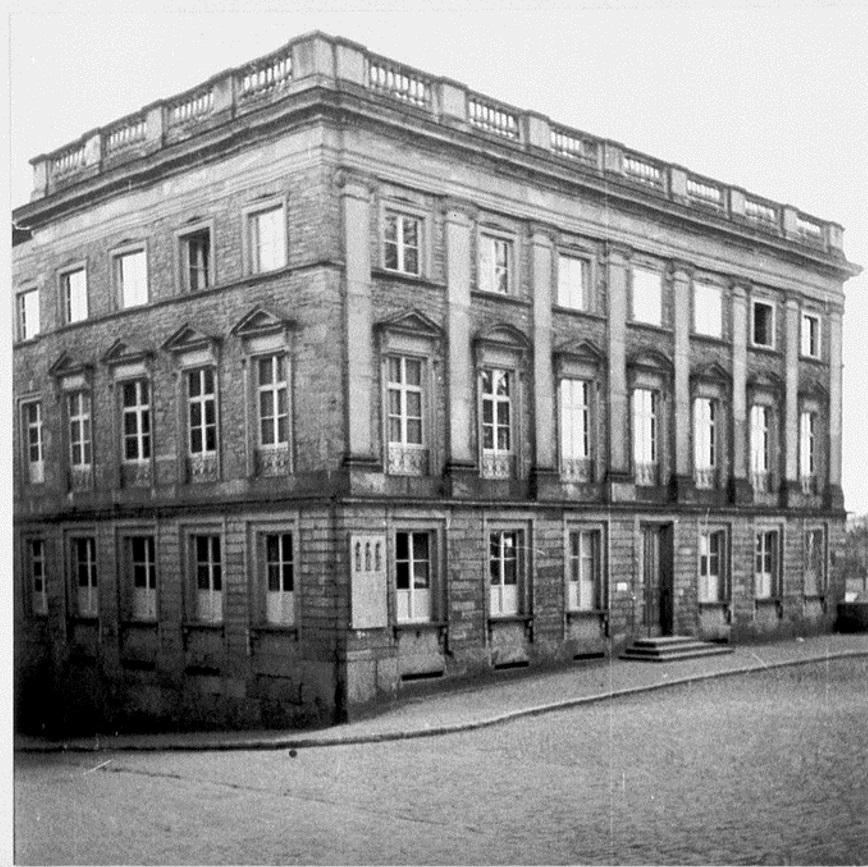 Osteiner-Bassenheimer-Dalberger Hof erbaut 1804-05